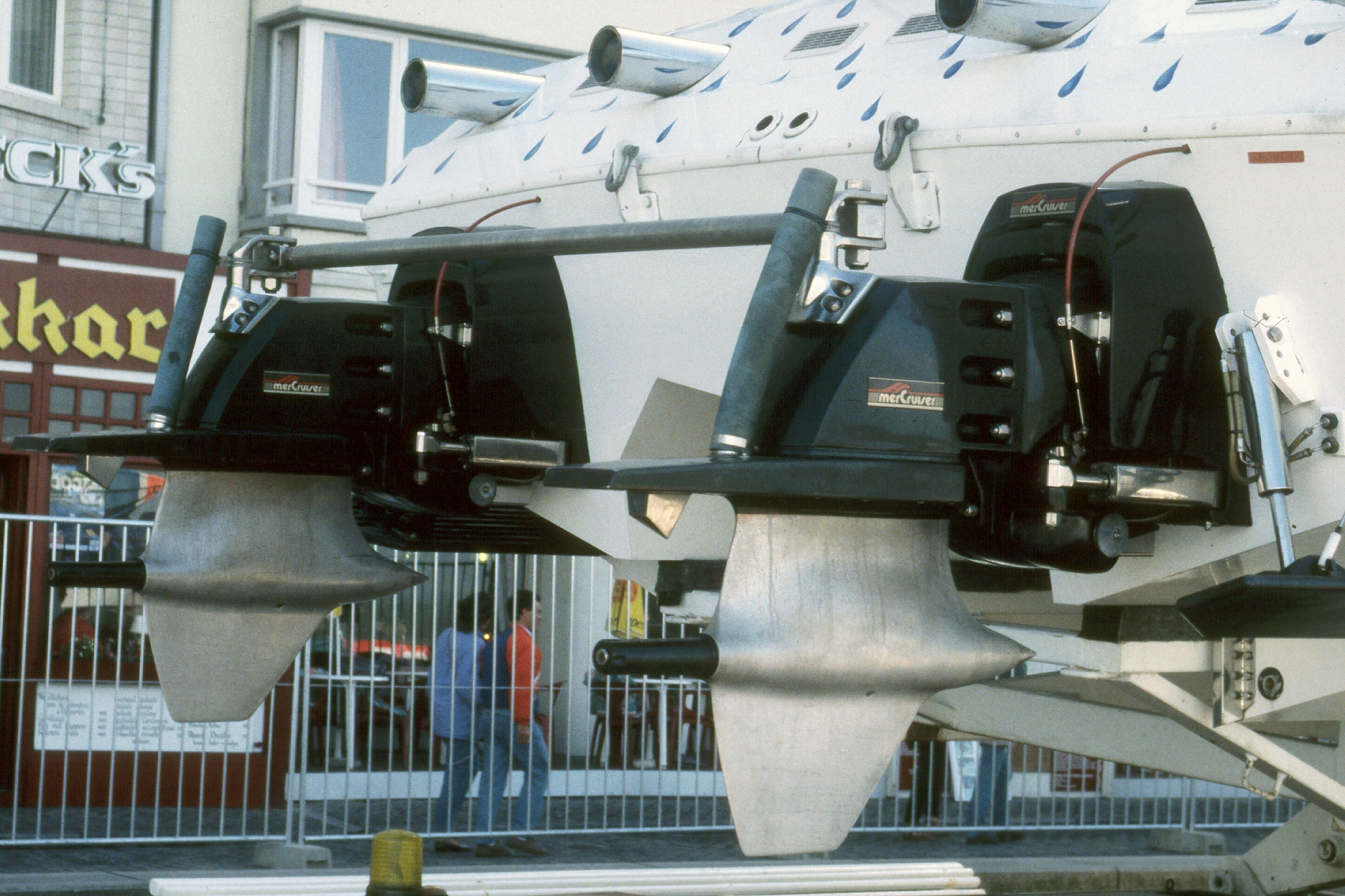 MerCruiser Z-Antriebe an einem Offshore-Rennboot